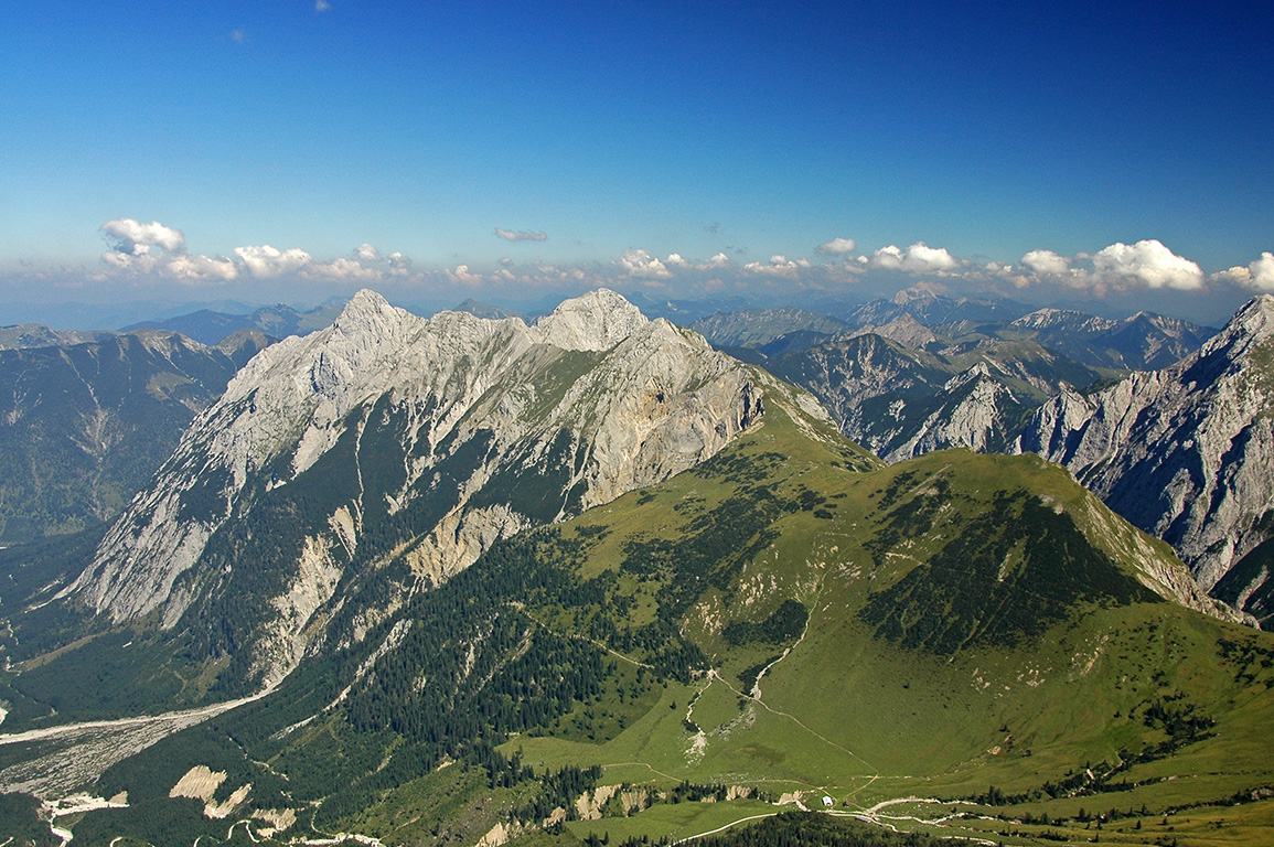 Falkengruppe (Karwendel)